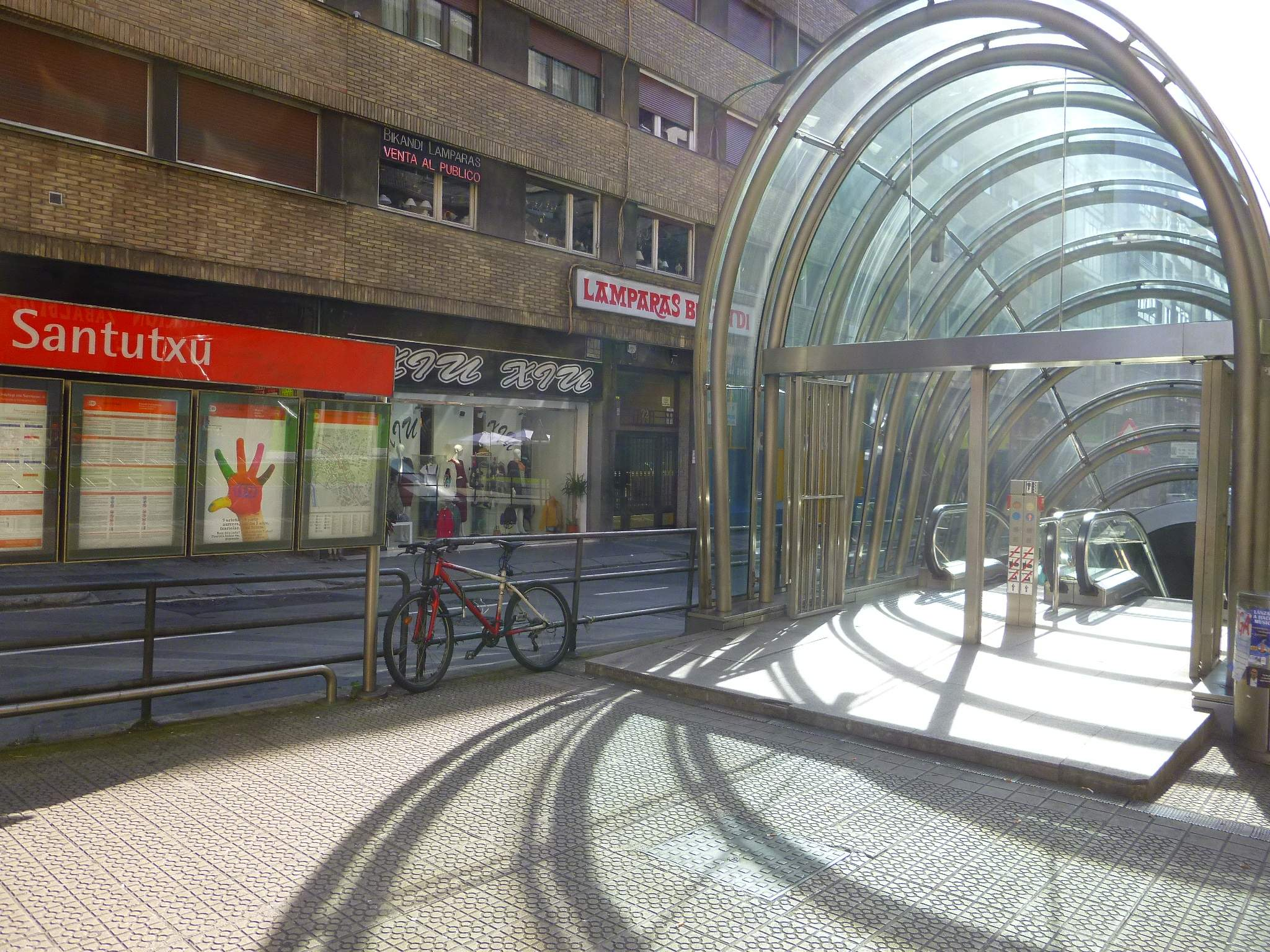 Bilbao - barrio de Santuxu, estación de Metro de Santutxu